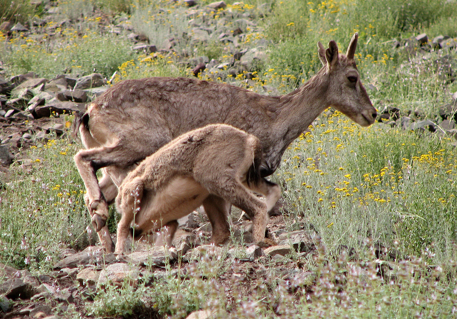 Bharal, Ladakh